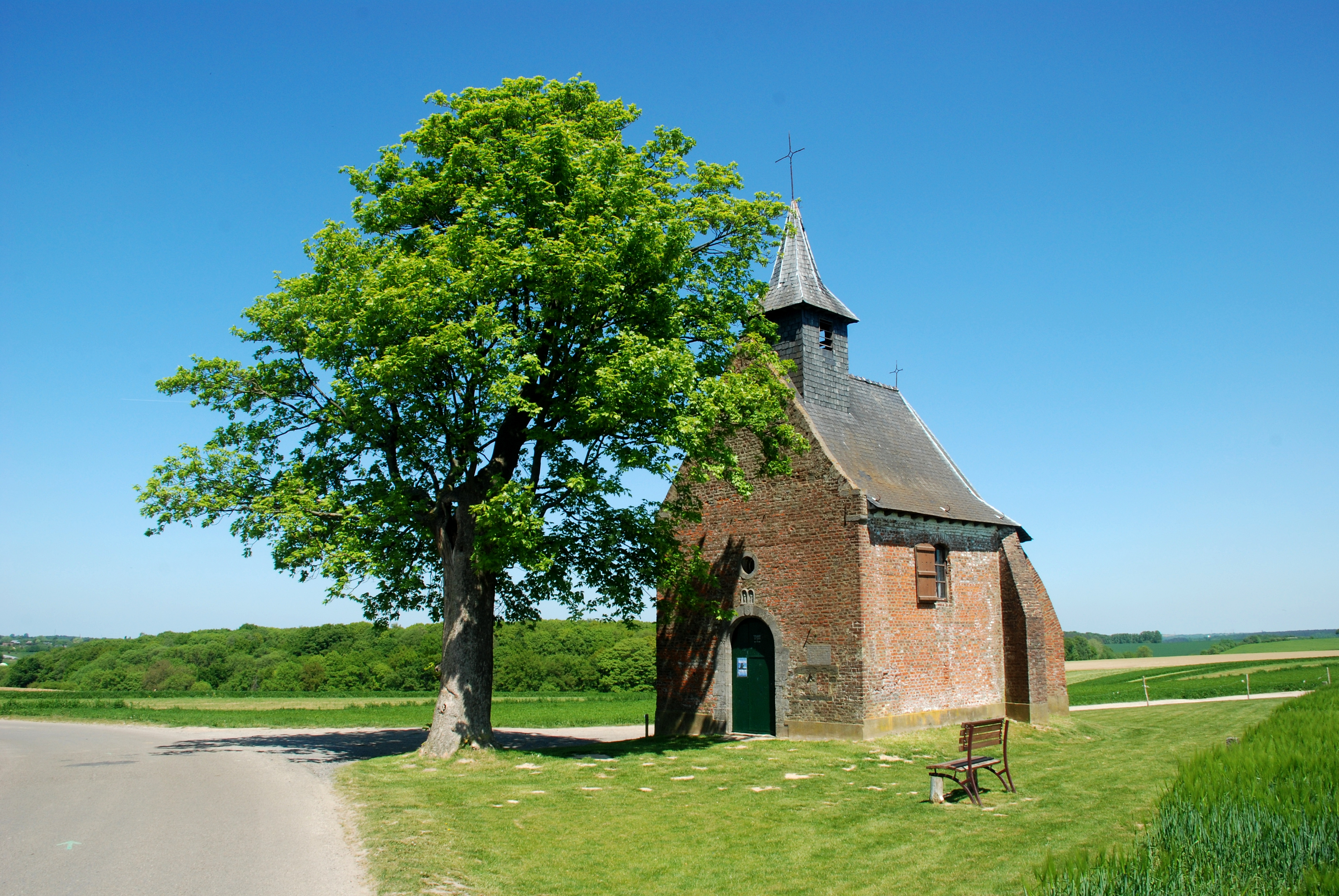 Belgique - Bousval - Chapelle du Try-au-Chêne